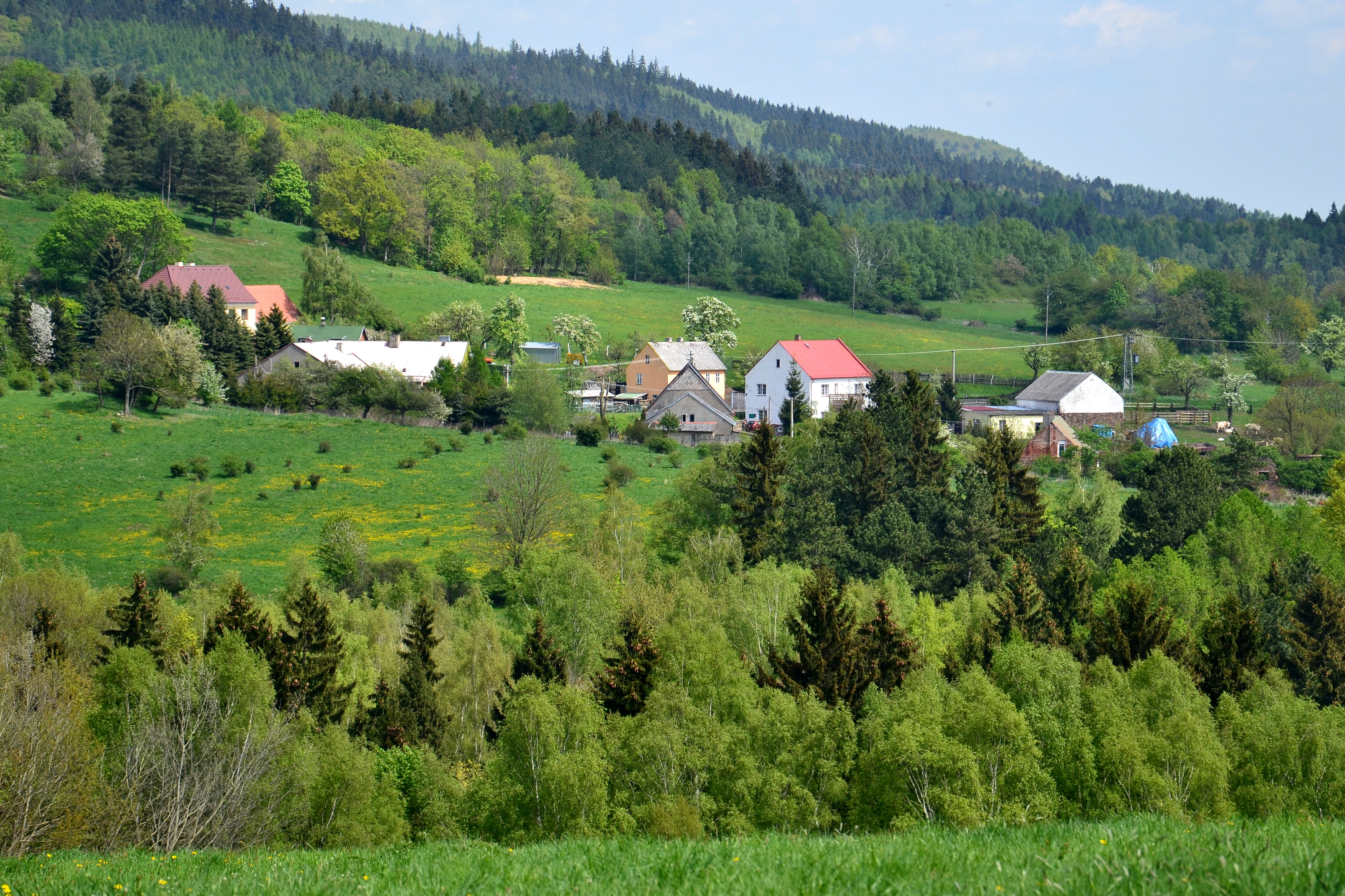 Louchov z jihozápadu